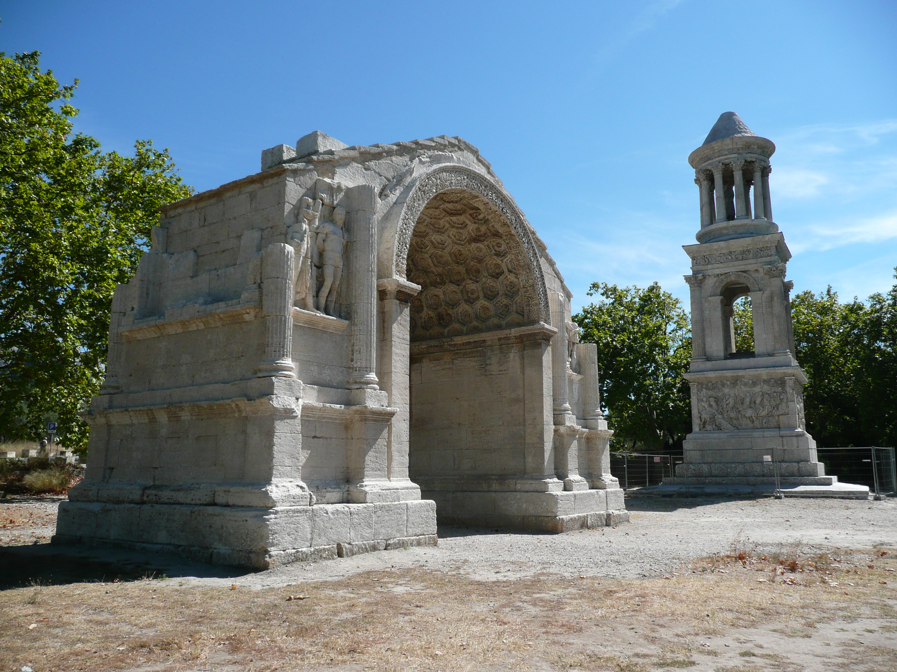 Arc de Saint-Rémy-de-Provence ; Glanum mausoleum